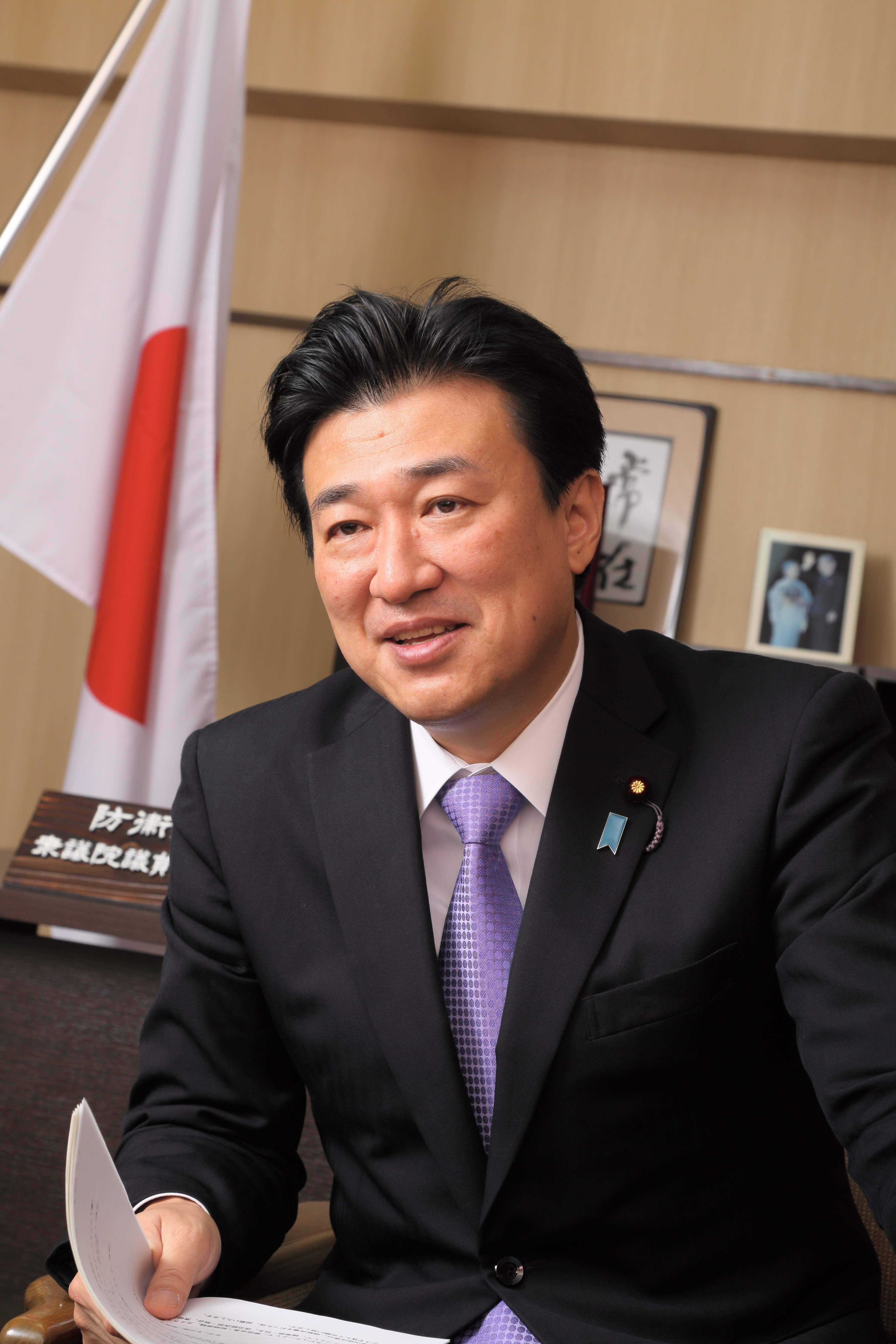 「くまもと経済」平成28年12月号表紙